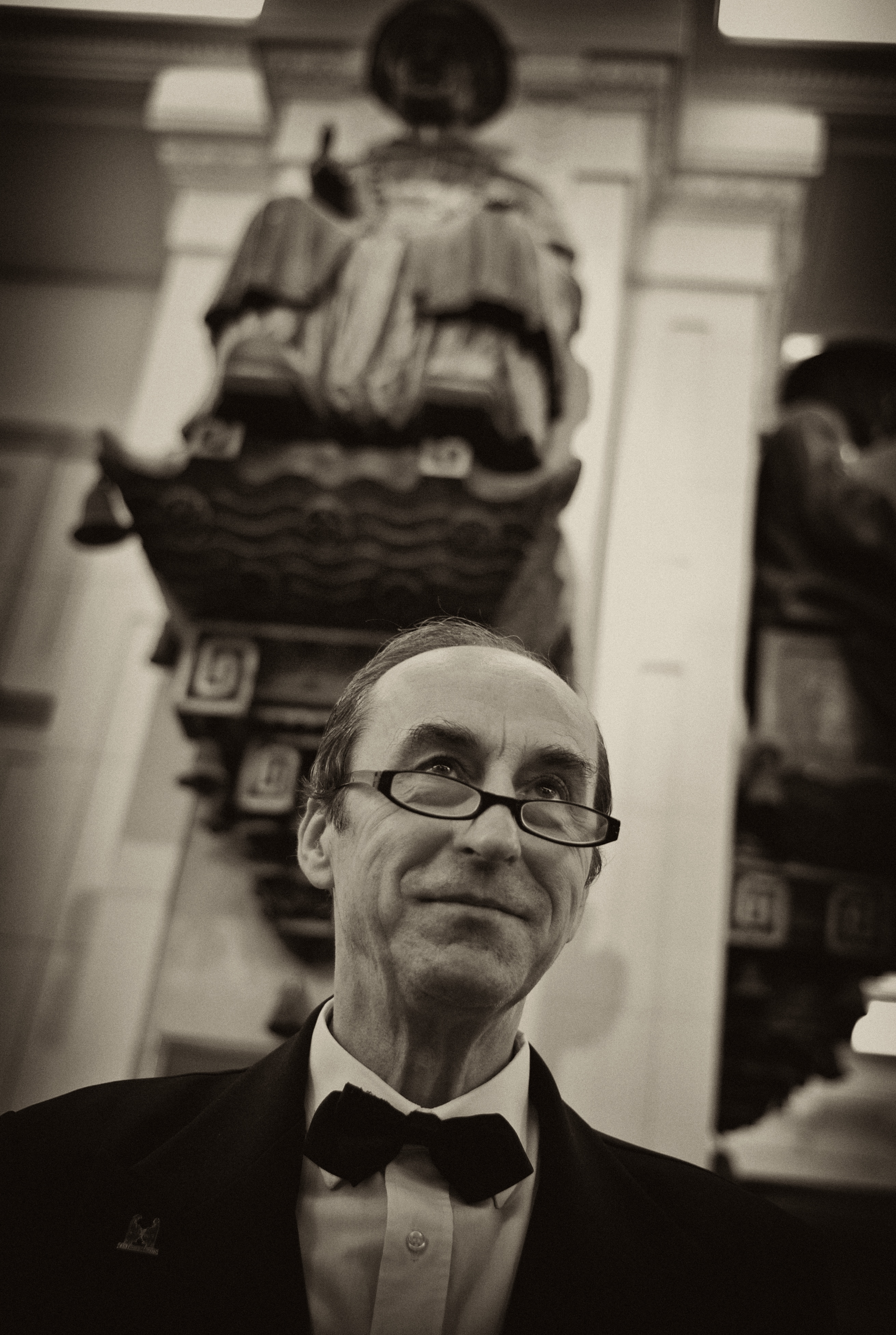 Un maitre d'hotel des Deux Magots, Paris 11, 2009.